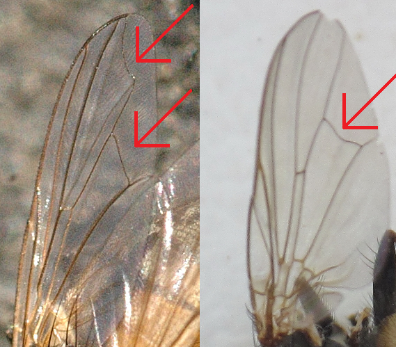 Right: Fannia canicularis, left: Musca domestica